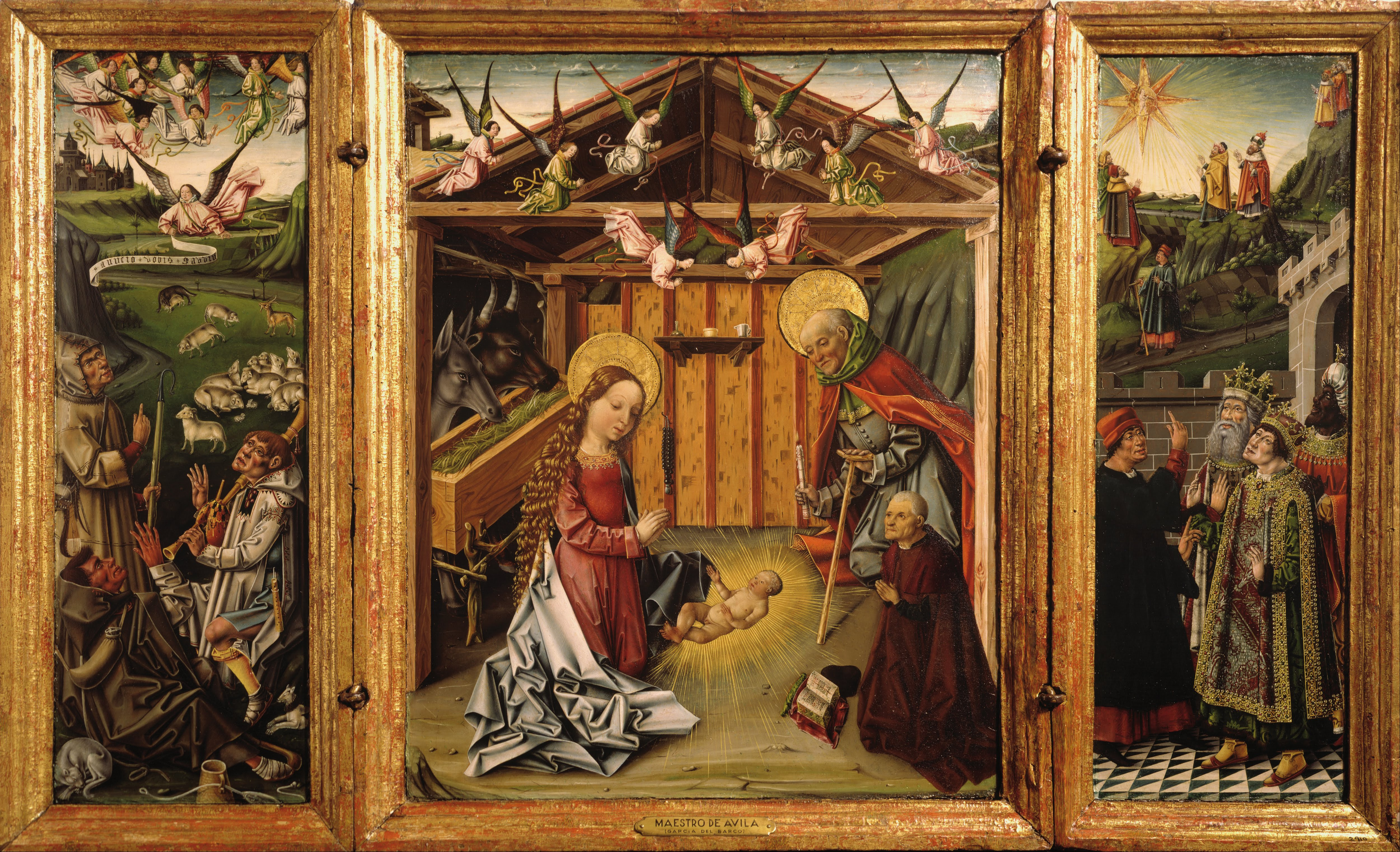 En este tríptico la Natividad de Jesucristo se desarrolla en tres escenas: el Nacimiento en el panel del centro, la Anunciación a los pastores en el lado izquierdo, y el Viaje a Belén de los Reyes Magos en el panel del lado derecho.